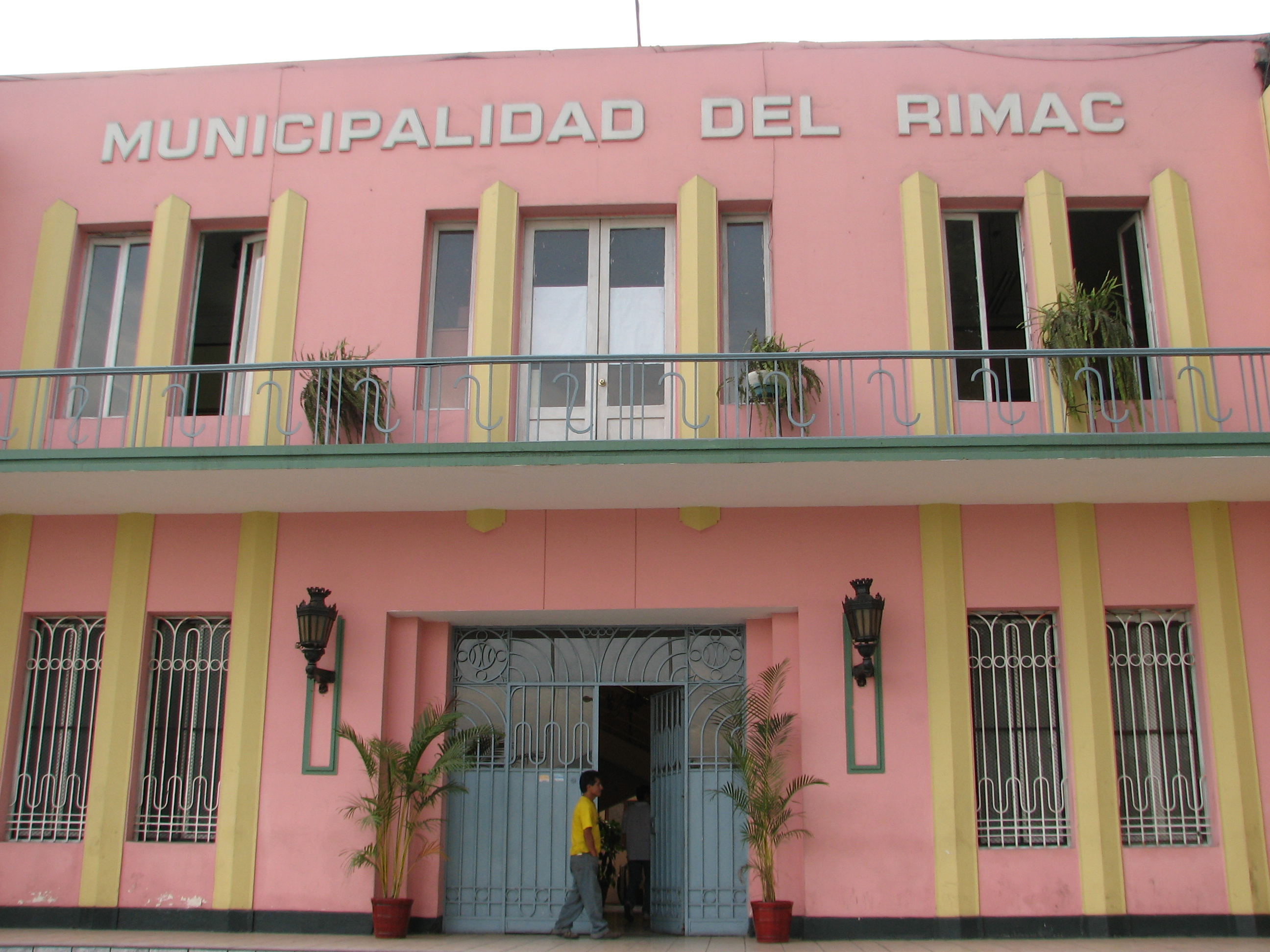 Municipalidad, Rímac/Lima, Peru.jpg